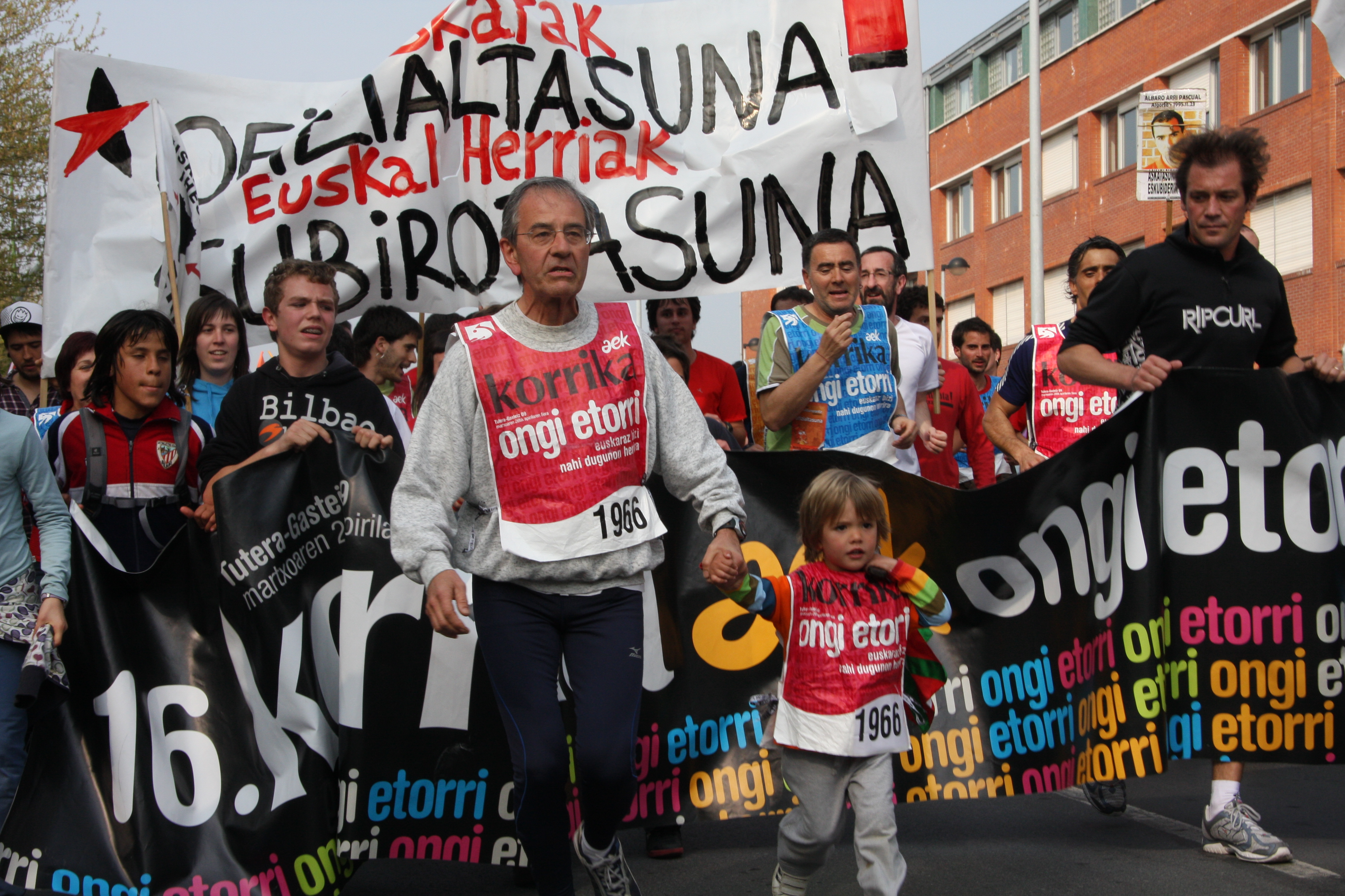 Km 1966 (de Areeta-Erromo, en Guecho, a Lejona) de la 16 edicion de la Korrika (3 de abril de 2009).